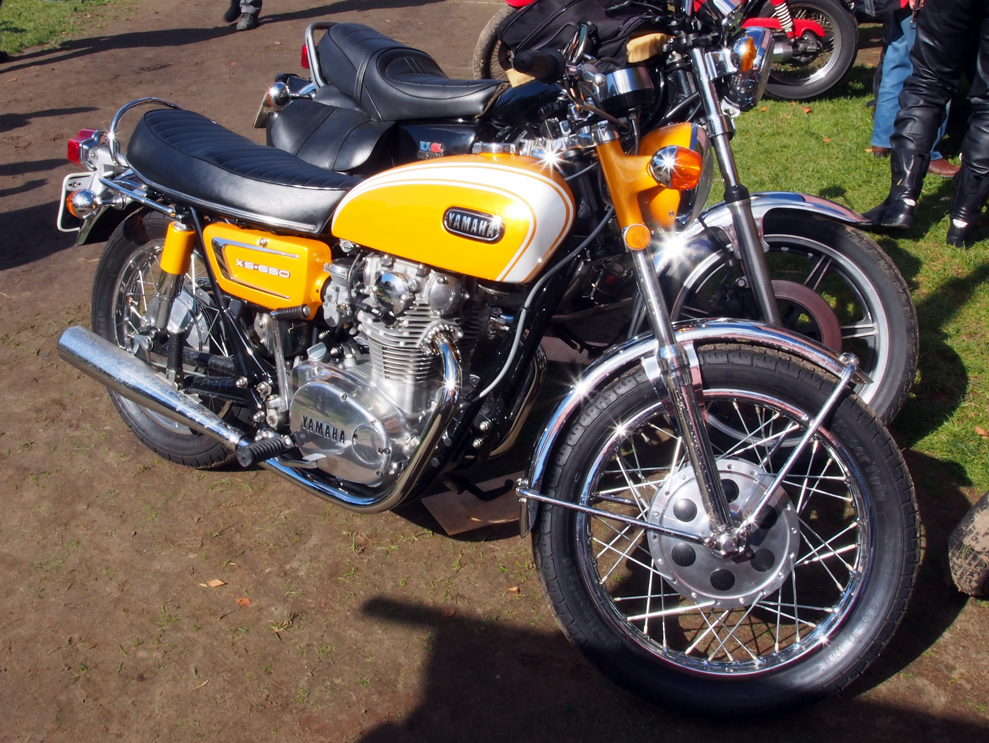 Orange Yamaha XS650.